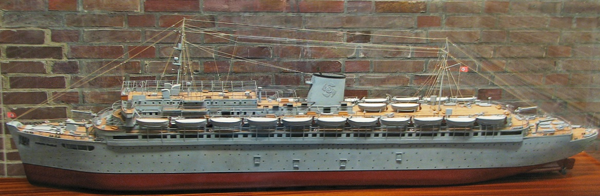 Dieses Bild zeigt ein Modell des Passagierschiffs „Wilhelm Gustloff“, ausgestellt im Marineehrenmal Laboe.